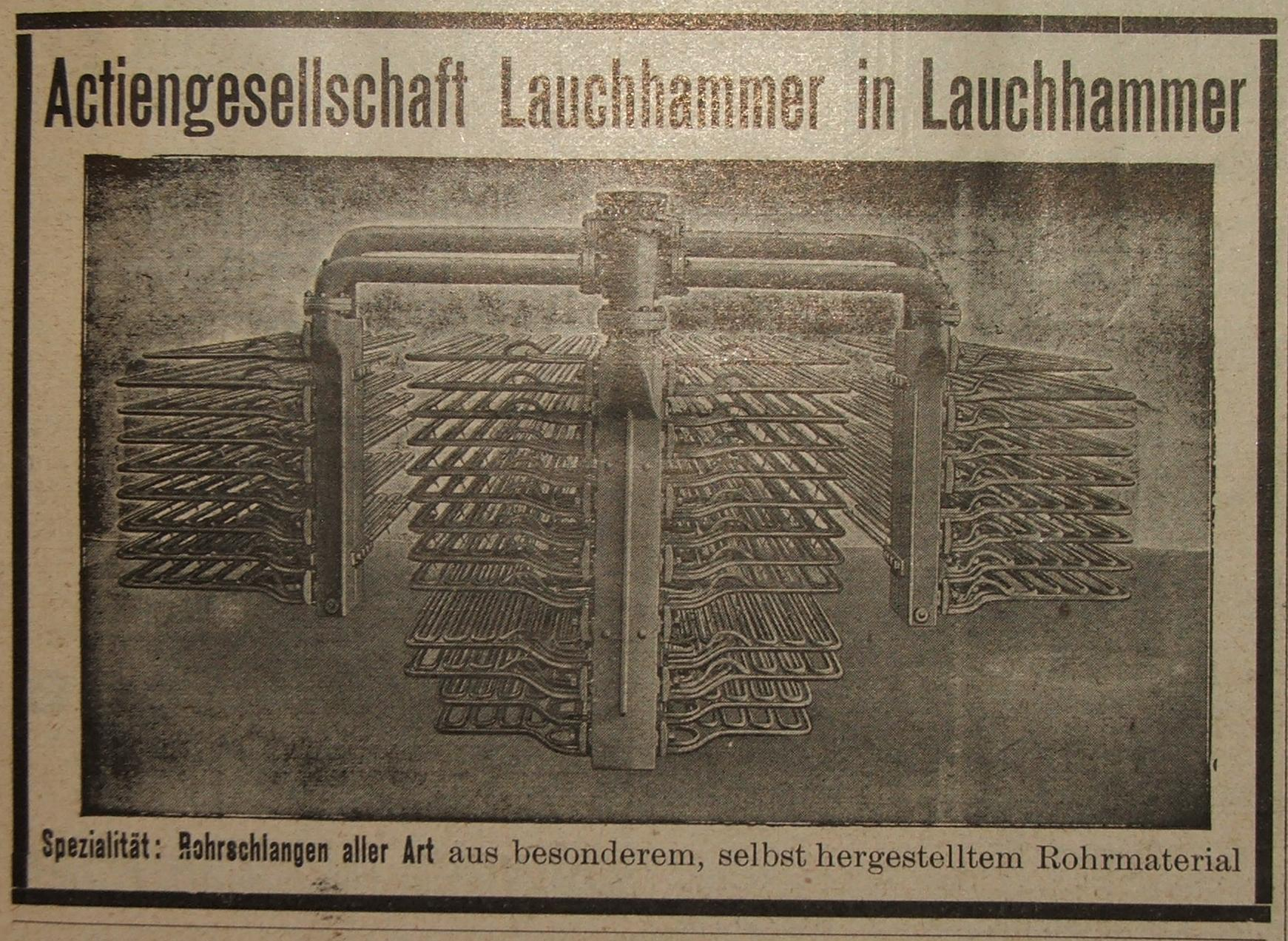 Actiengesellschaft Lauchhammer: Alte Werbung aus der Fachzeitschrift "Hansa", Jahrgang 1913.jpg